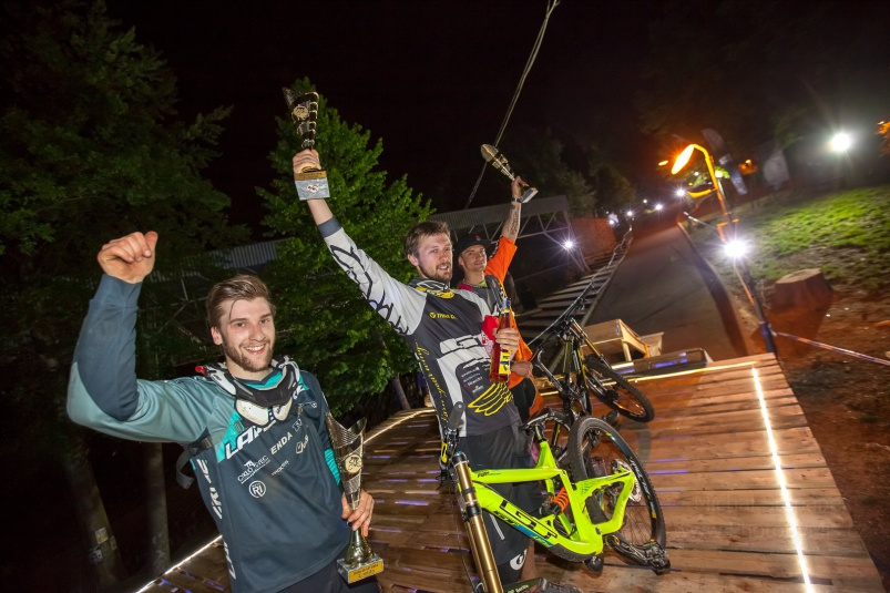 Кунаев Иван. Дуал-слалом, Чехия, 1 место.